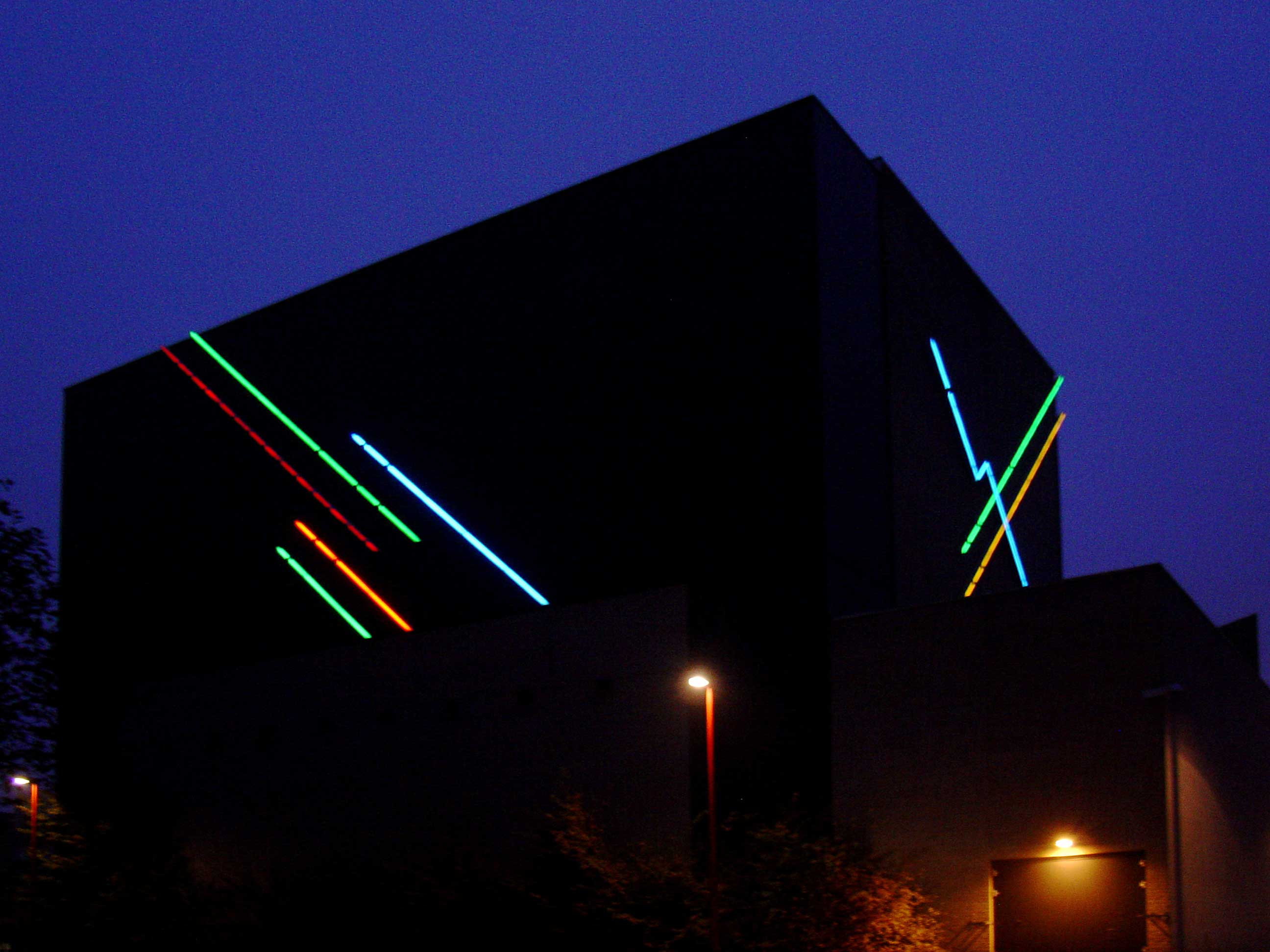 Zonder titel (objecten met neon, reliëf, 1991) door Margot Zanstra - Boelekade (Schouwburg) Gouda